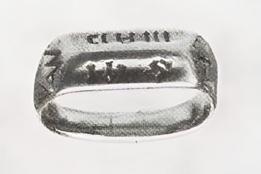 Anneau présumé de Jeanne d'Arc. Photographie publiée en planche II dans Catalogue of finger rings brought together by F.A. Harman Oates, F.S.A., ouvrage imprimé en 1917 par l'antiquaire Frederick Arthur Harman Oates, secrétaire au Musée de Londres.